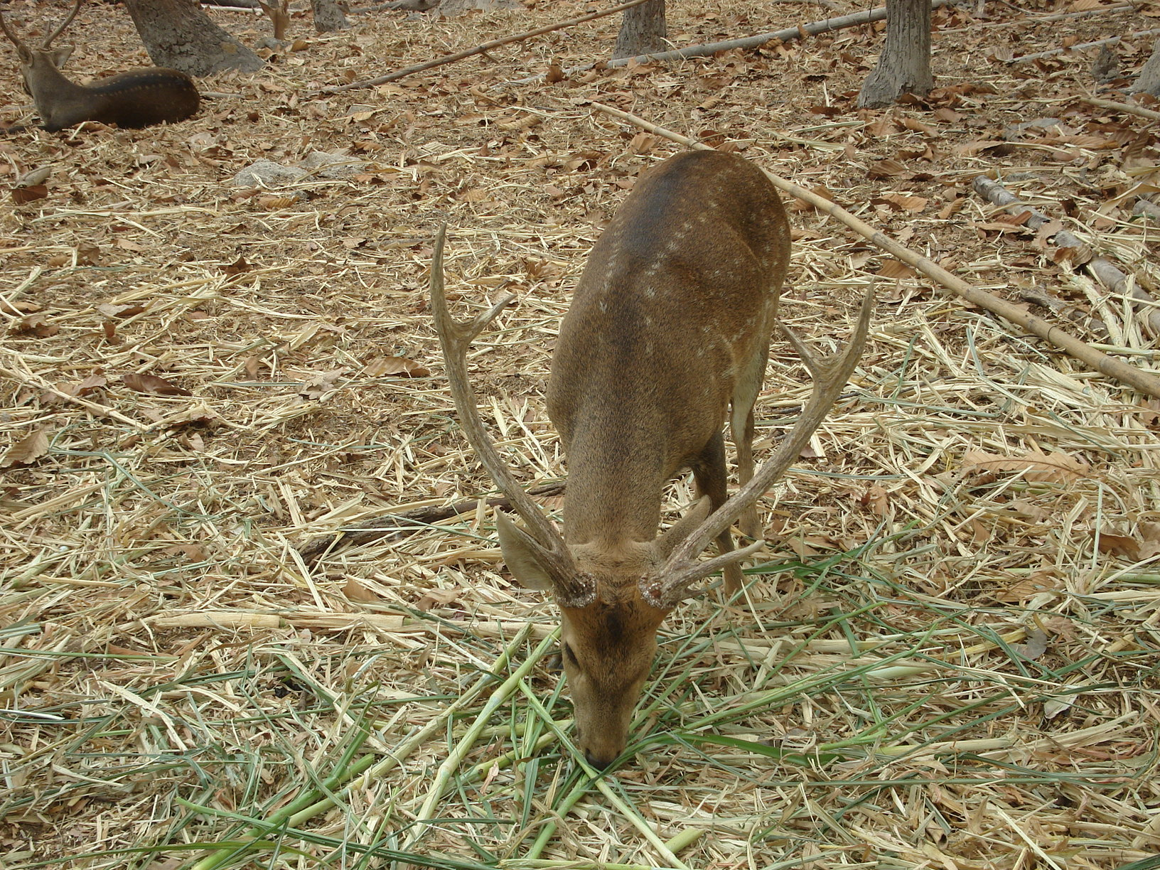 Deer in Chiang Mai zoo